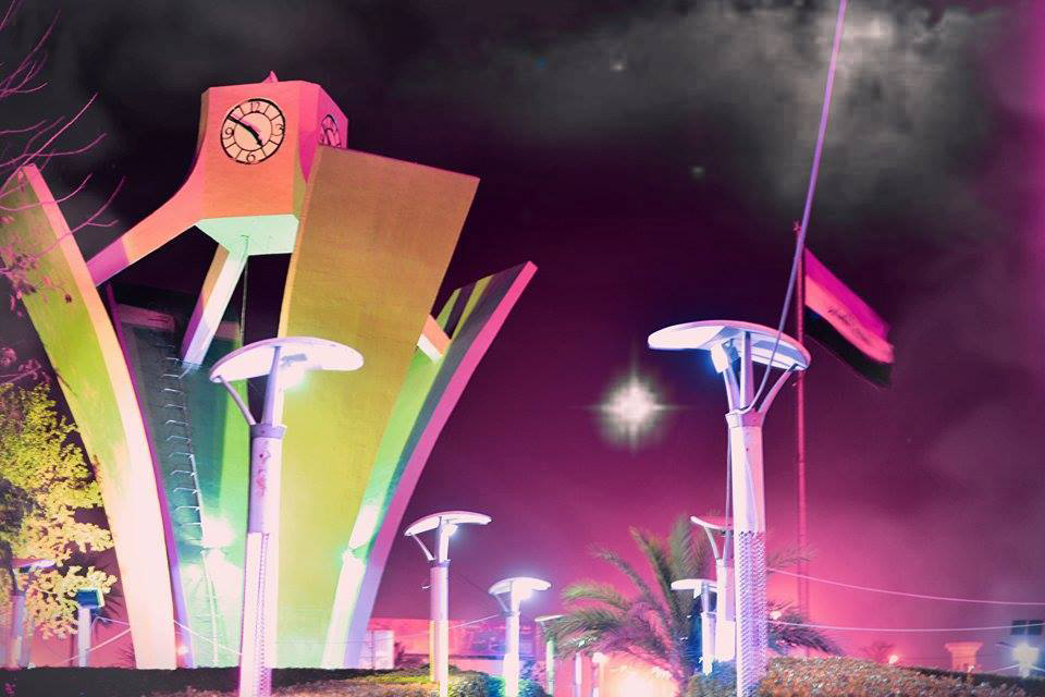 فلكة الساعة في الديوانية ليلاً